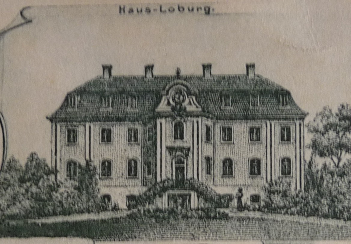 Der alte Schlaunbau vor 1899